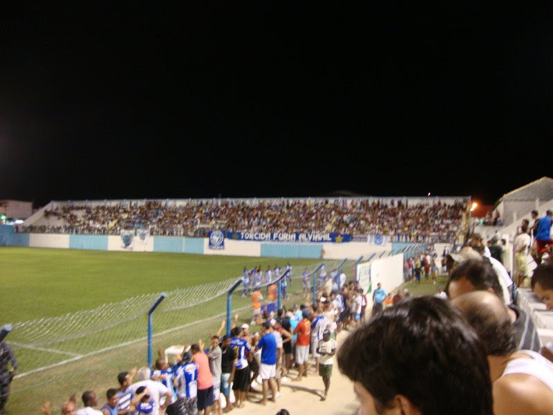 Sernamby